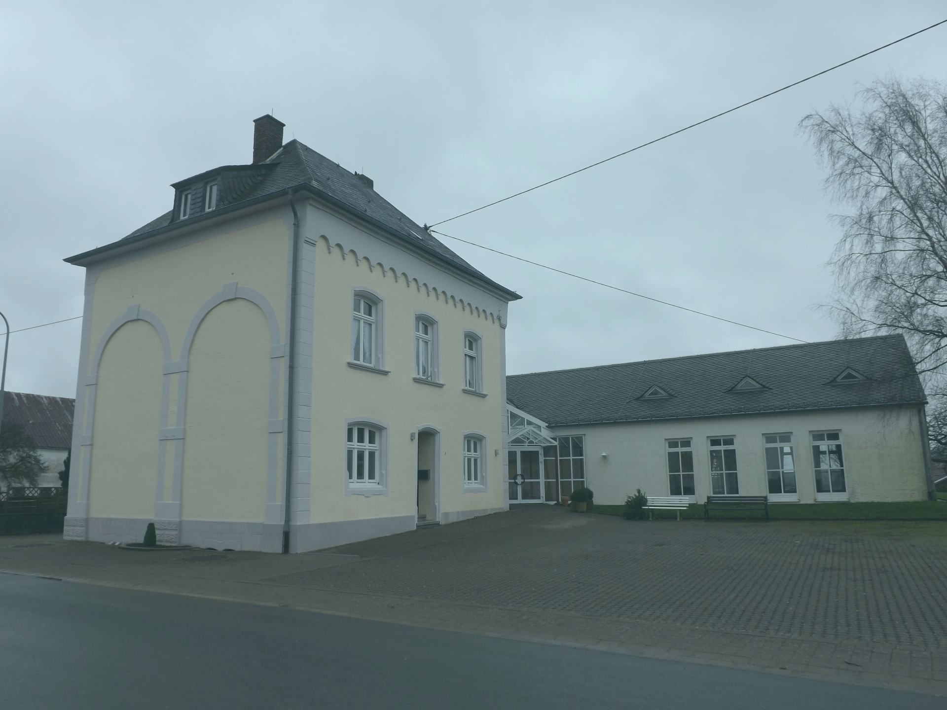 Das alte Pfarrhaus und der angrenzende Pfarrsaal